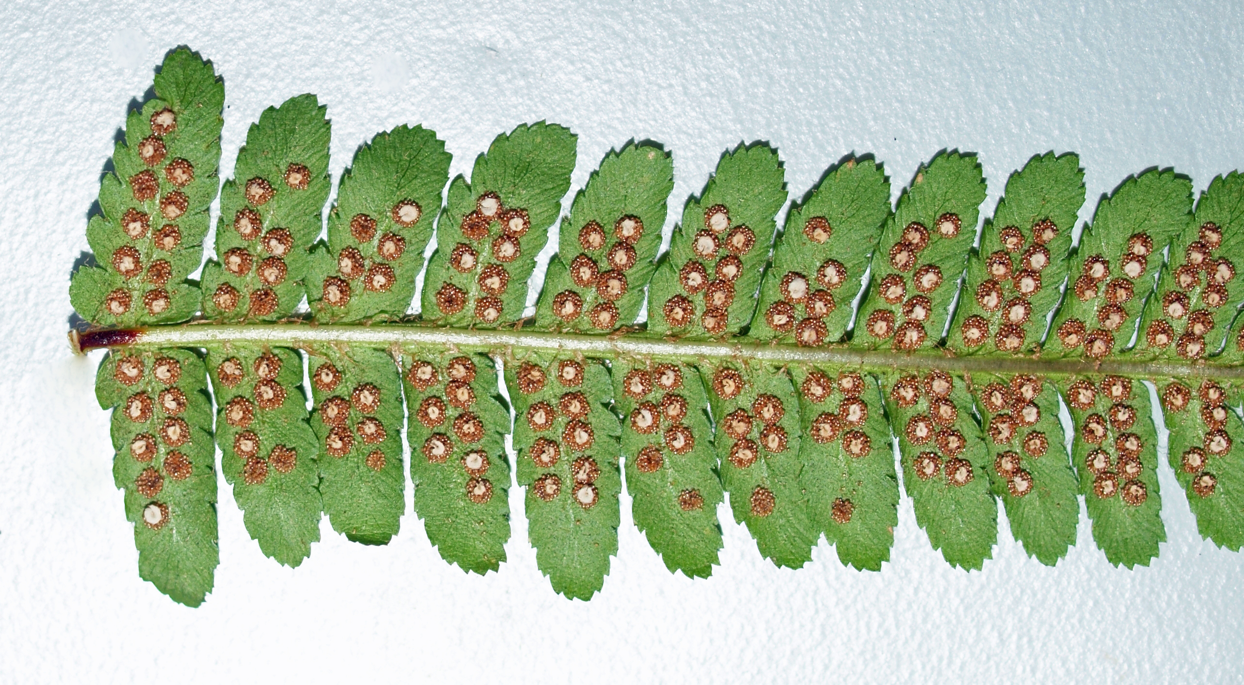 Spreuschuppiger Wurmfarn (Dryopteris affinis) mit violettschwarzem Grund der Hauptfiedern.